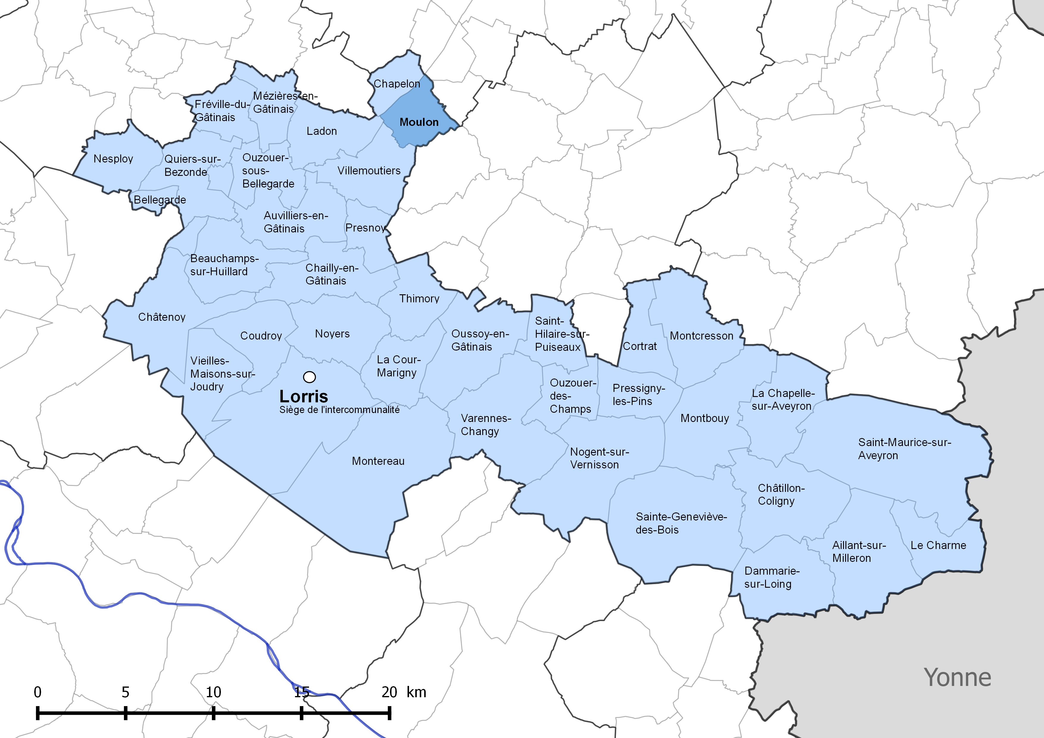 Périmètre de la communauté de communes Canaux et forêts en Gâtinais - Situation de la commune de Moulon (Loiret).